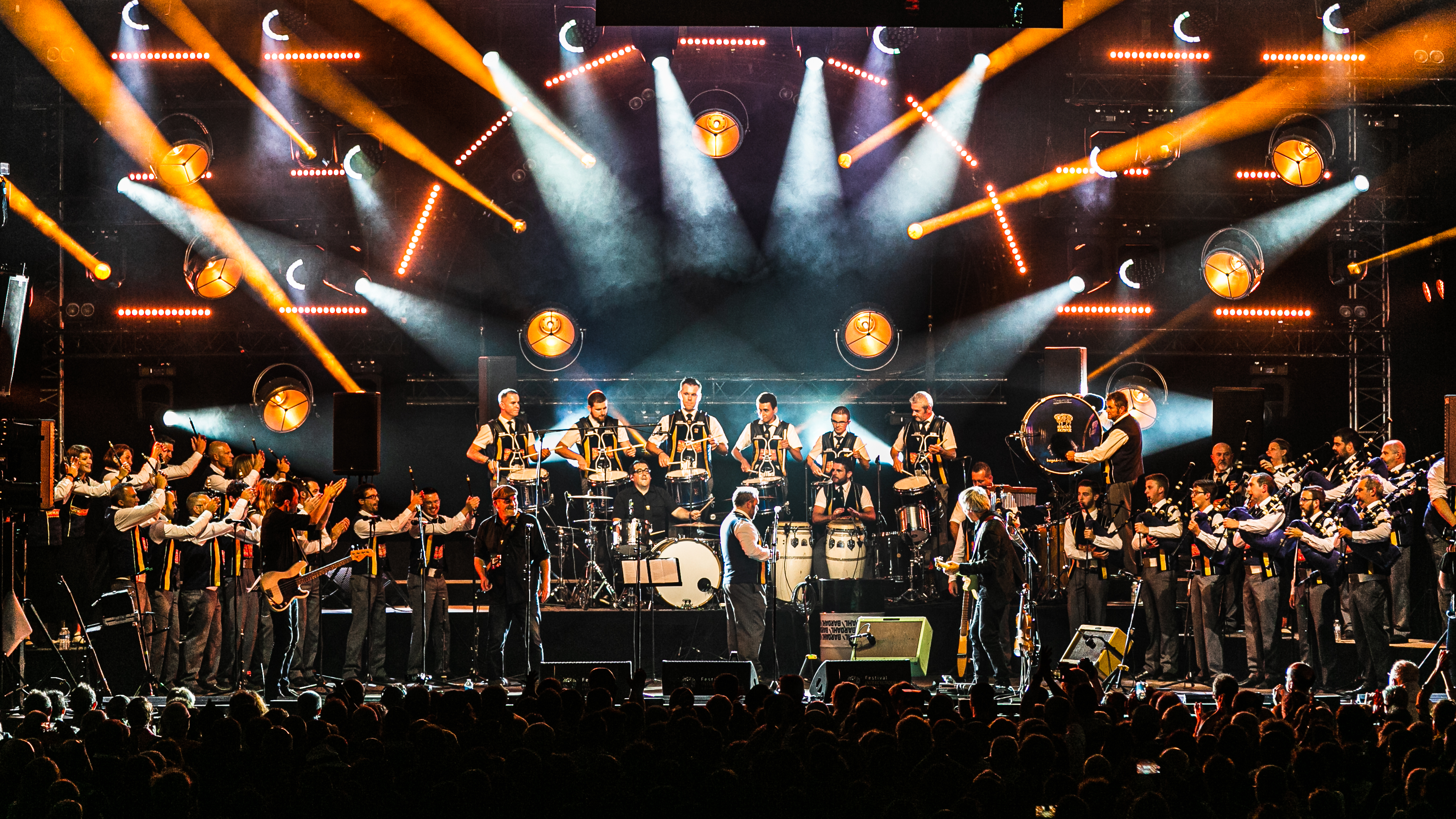 Création Nerzh du Bagad Kemper et Red Cardell qui célébrait les 70 ans du bagad dans le cadre du Festival Interceltique de Lorient, à l'Espace Marine, le 9 août 2019.